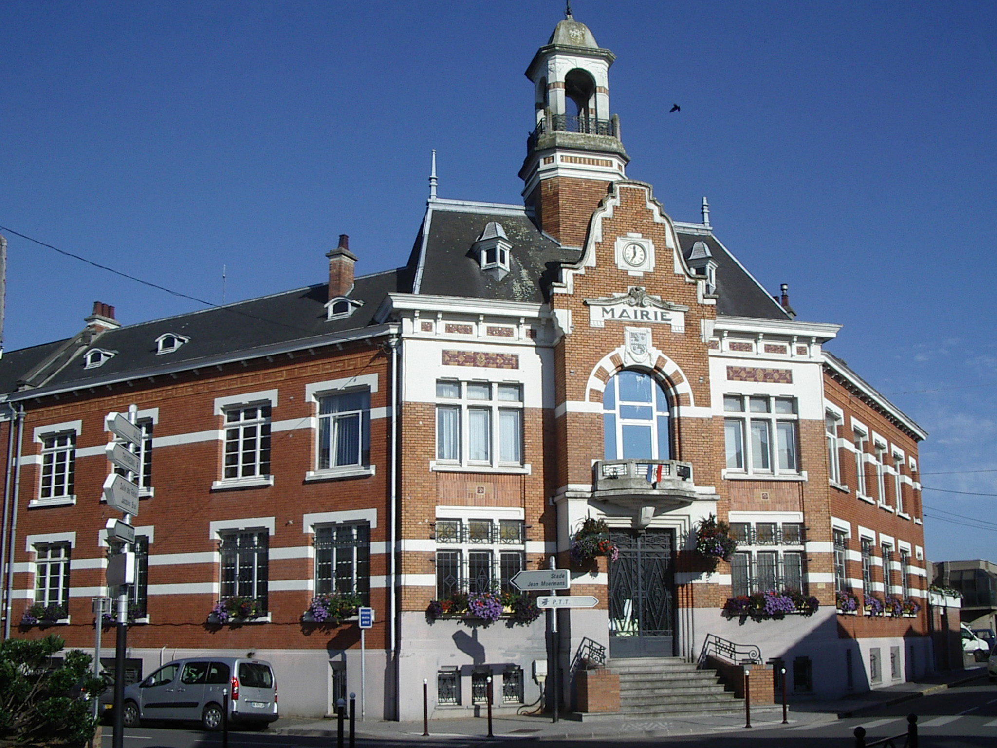 Mairie de Faches-Thumesnil (France, Nord)